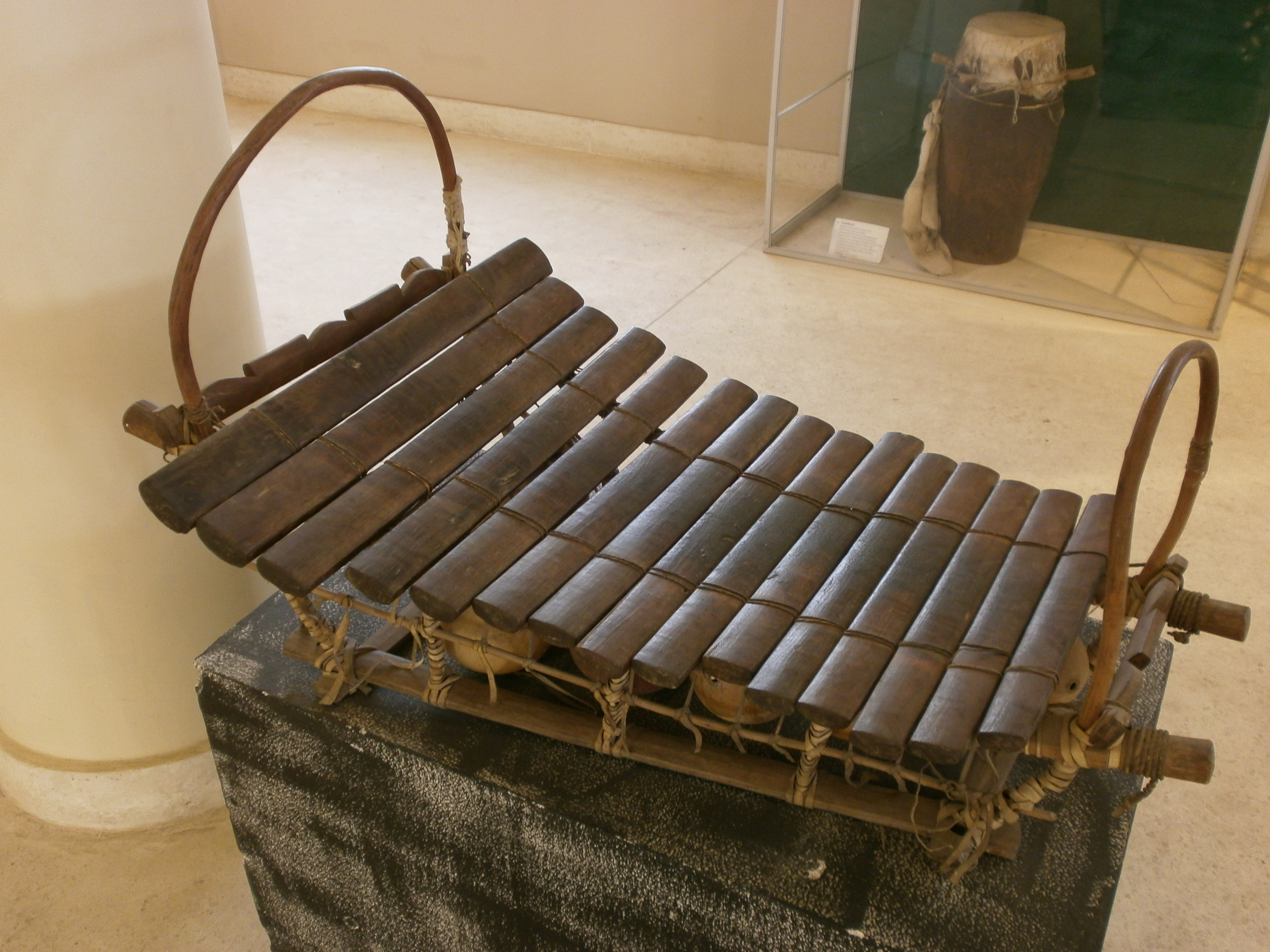 IFAN, Dakar - Instrument